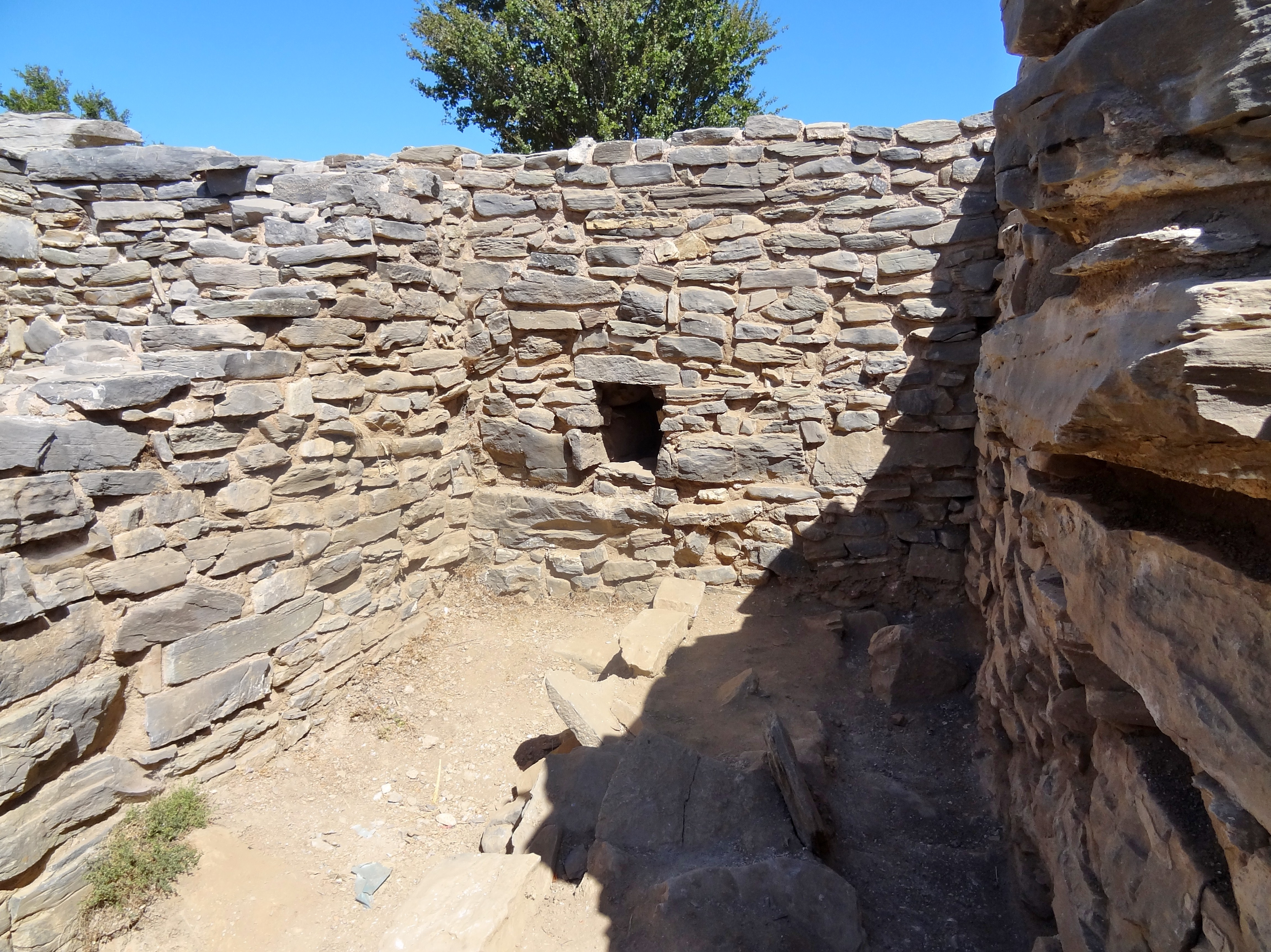 Ausgrabungsstätte von Zominthos, Gemeinde Anogia, Kreta, Griechenland